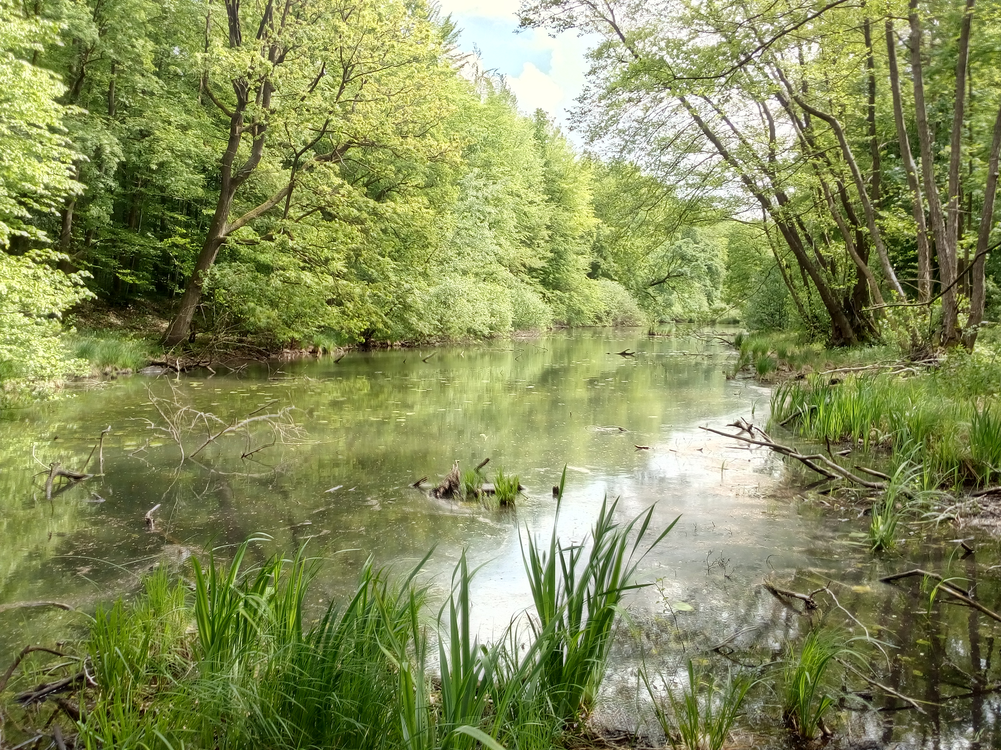 Der Hagenbacher Altrhein im Natuschutzgebiet Stixwörth